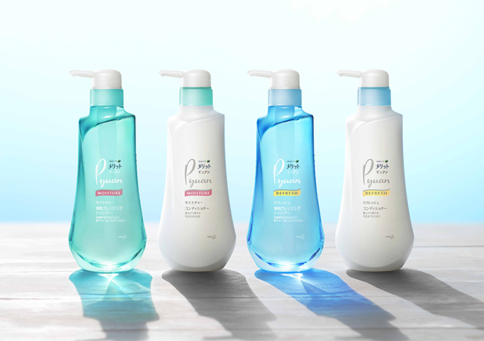 シャンプー, トリートメントのパッケージ